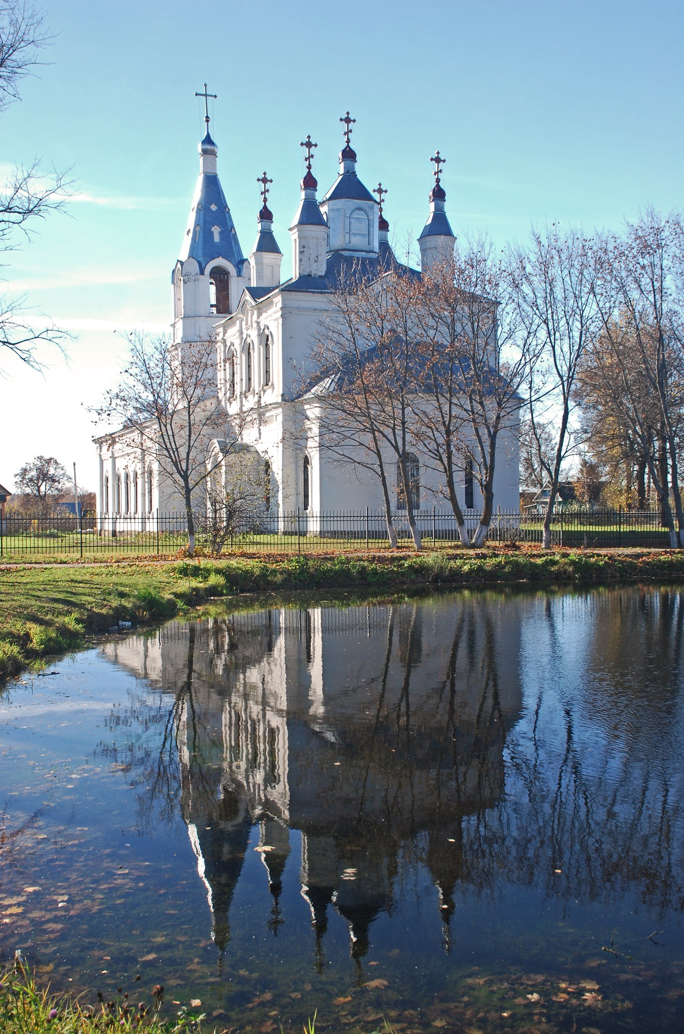 Церковь Воскресения Христова (Москва и Московская область, Волоколамск, село Раменье)